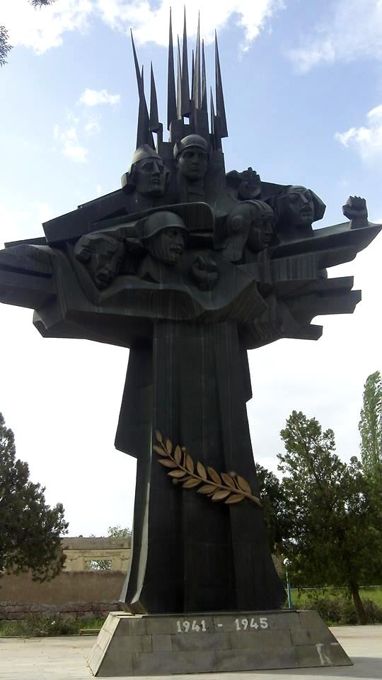 WW 2 monument in the village of Doghs 38/3